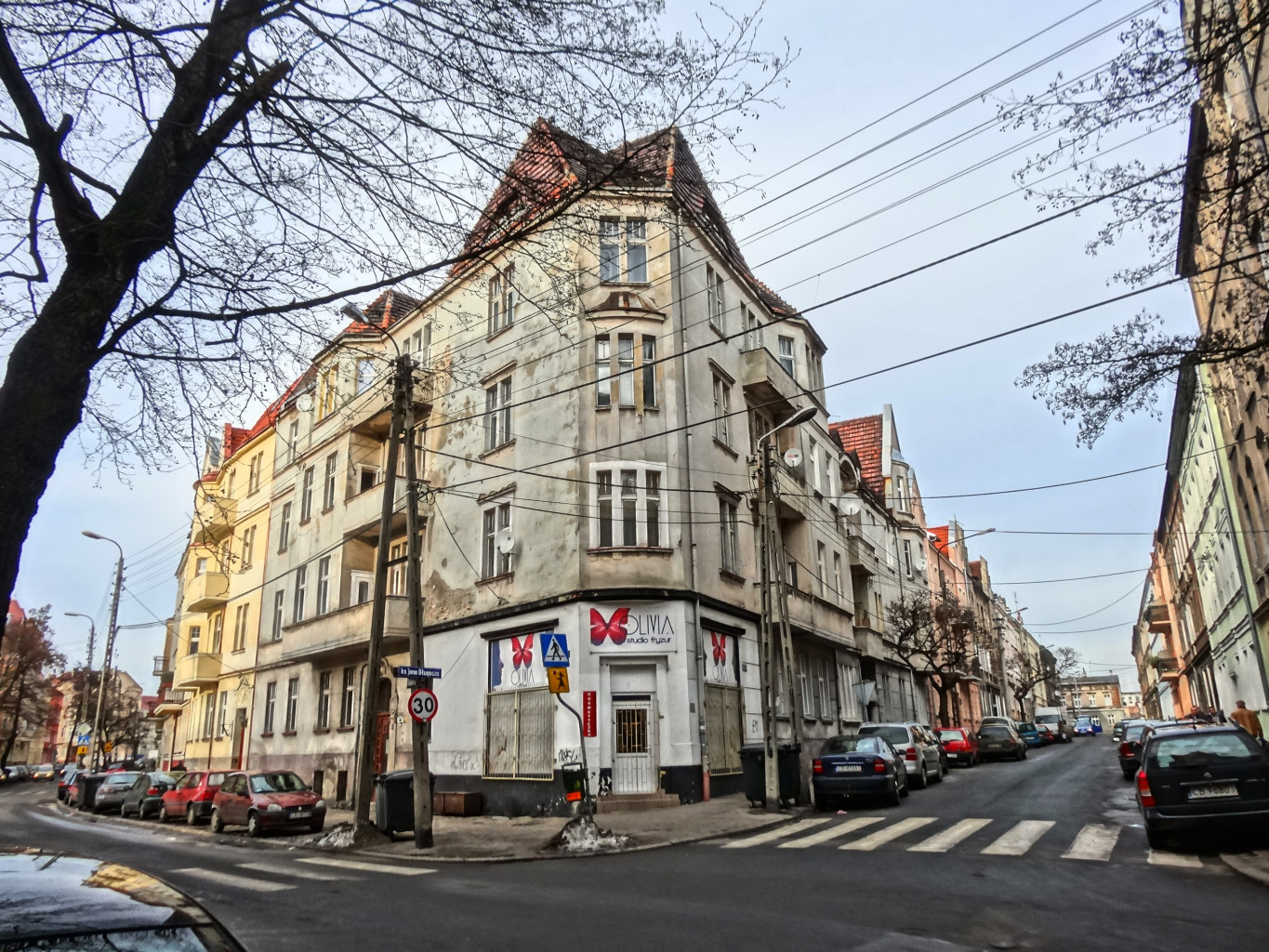 Ulica Śląska na osiedlu Okole w Bydgoszczy. Skrzyżowanie z ul. Jana Długosza